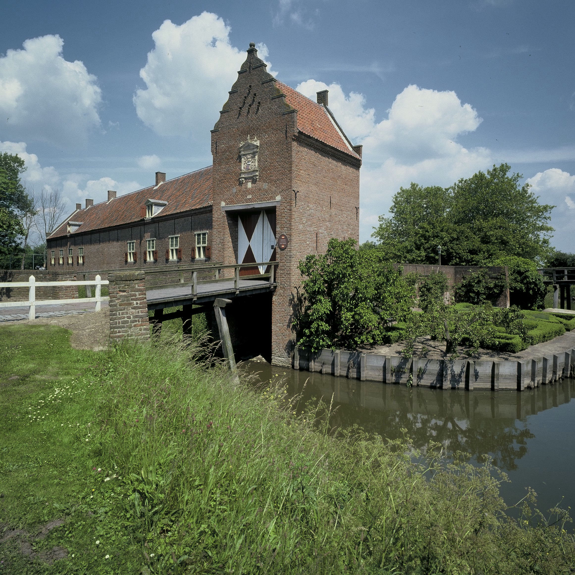 Kasteel Ammersoyen: Voorburcht, overzicht van het poortgebouw, gezien vanuit het westen (opmerking: Gefotografeerd voor het boek "Geldersche Kasteelen" door J.C. Bierens de Haan en J.R. Jas)